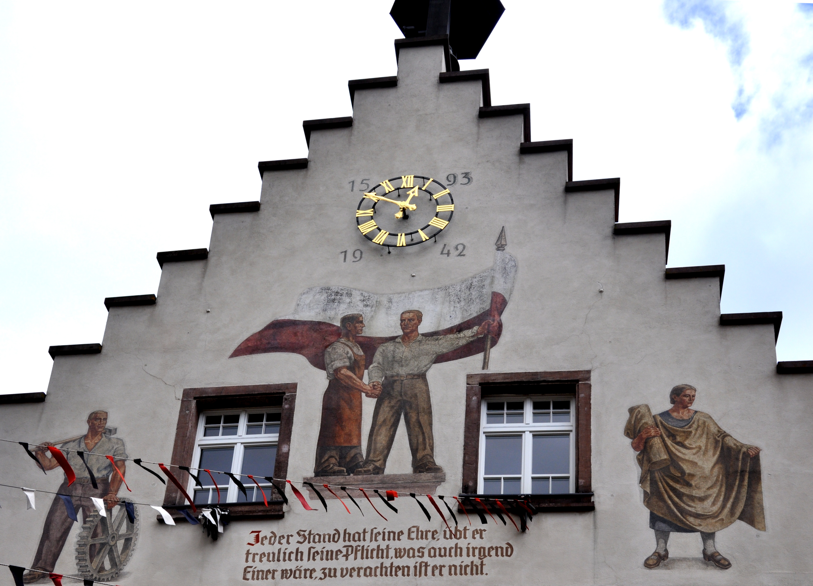 Schiltach, Rathaus, Fassade mit Bemalung von Eduard Trautwein, 1942